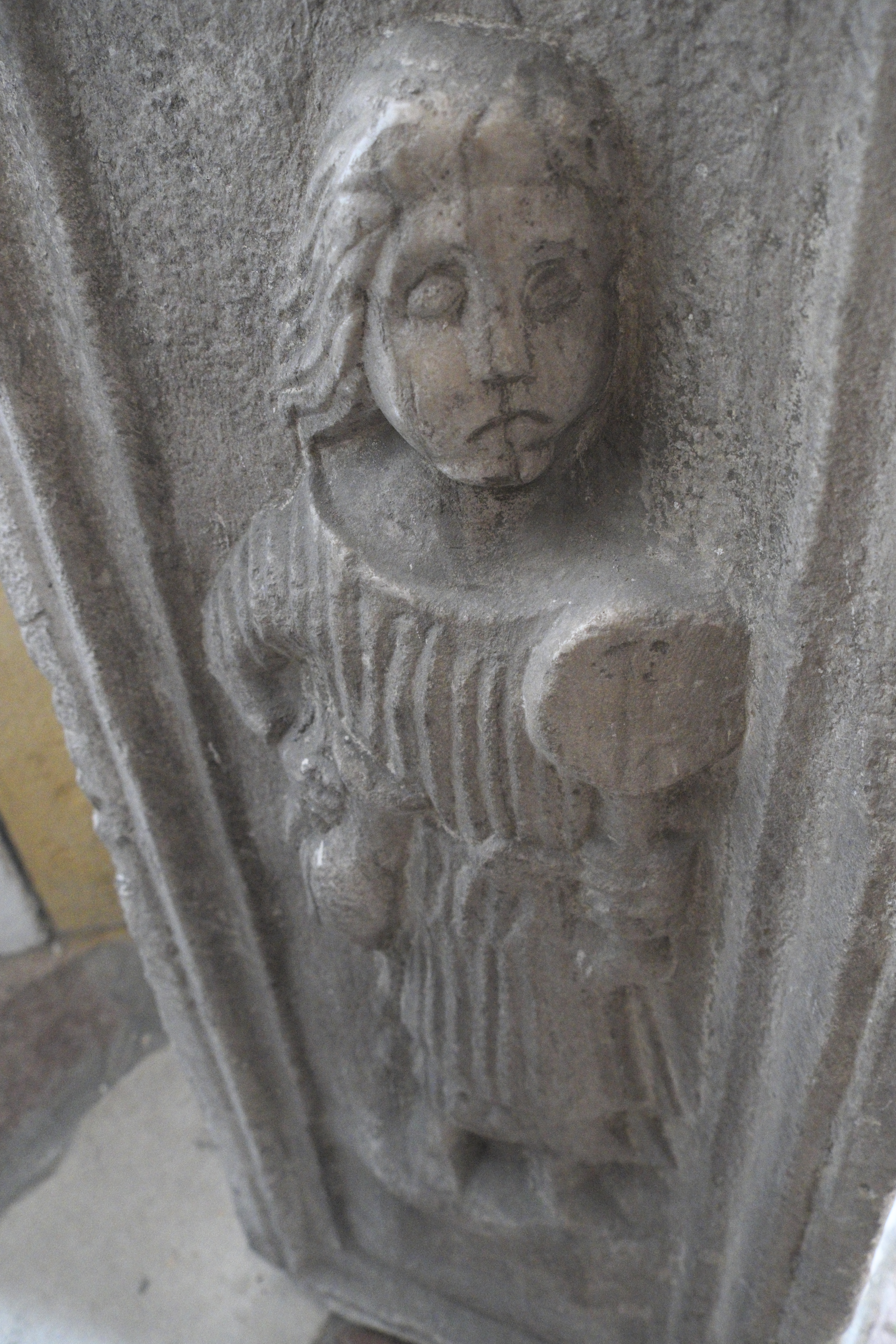 Katholische Pfarrkirche Mariä Himmelfahrt in Gröbming im Bundesland Steiermark (Österreich), römischer Grabstein